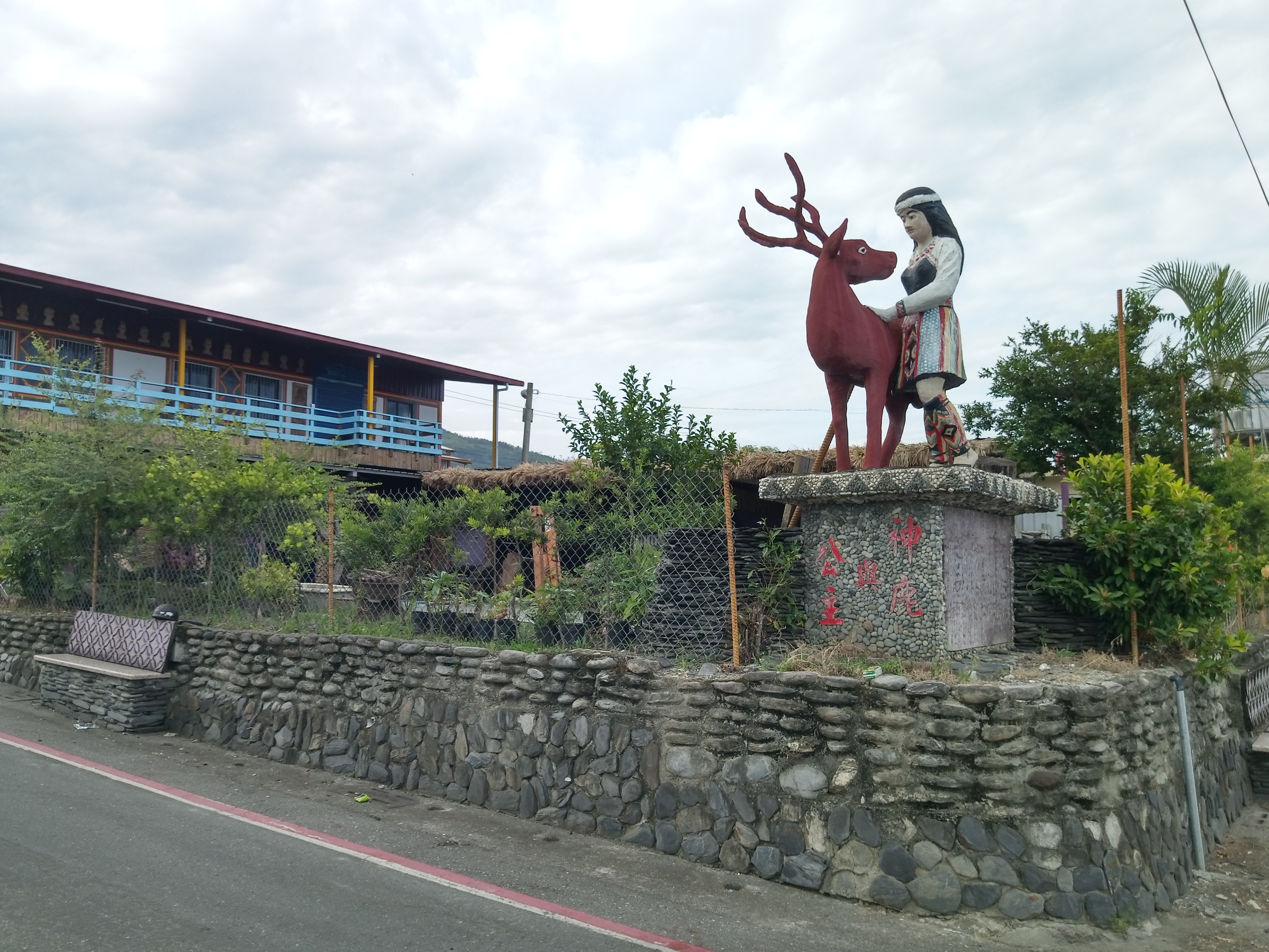 建和木雕藝術村大門裝置藝術